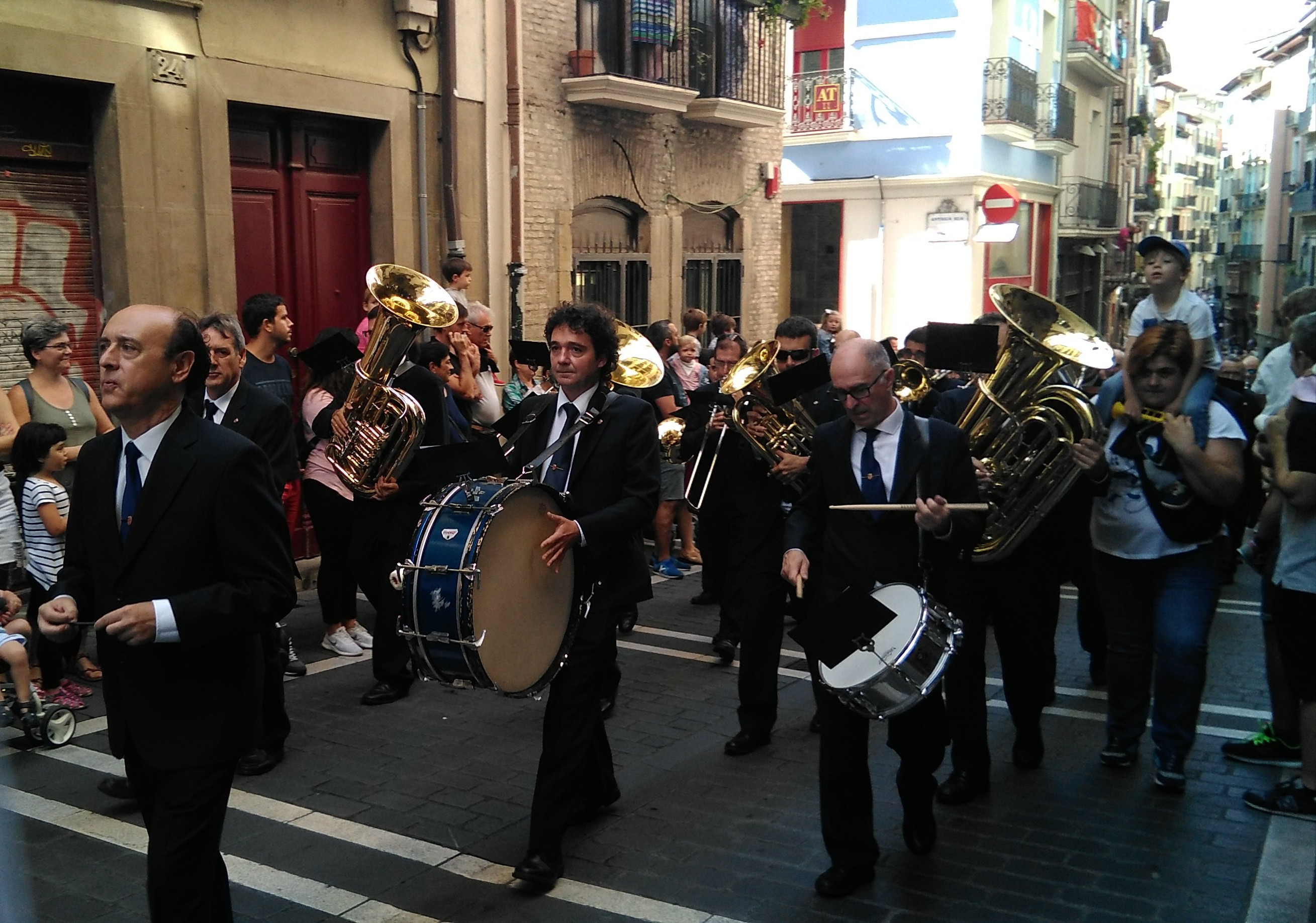 Pamplonesa en el desfile del Privilegio de la Union.